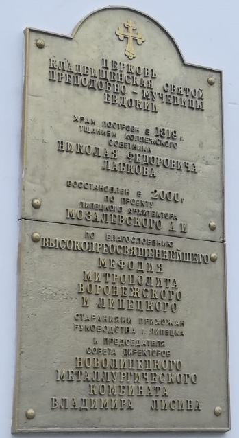 Евдокиевская церковь в Липецке